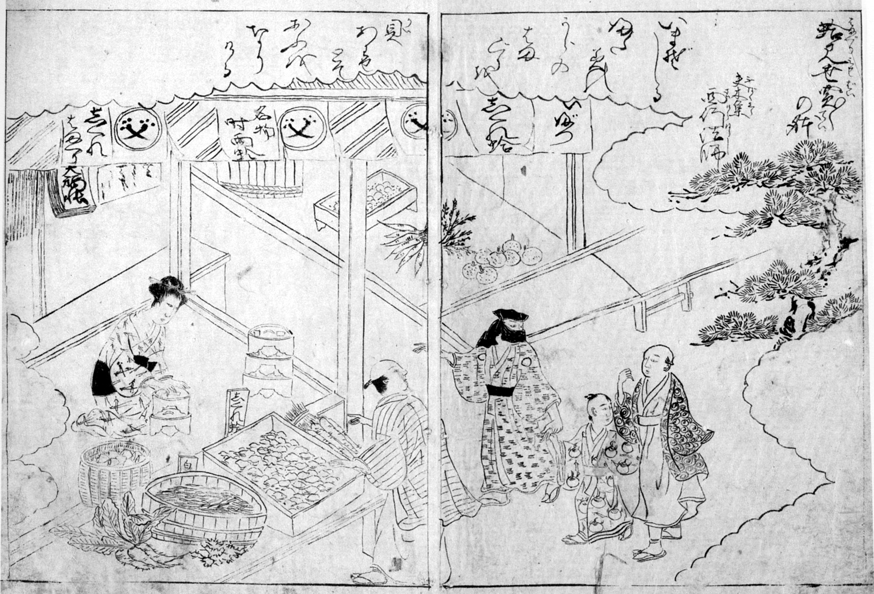 蛤見世売買の躰